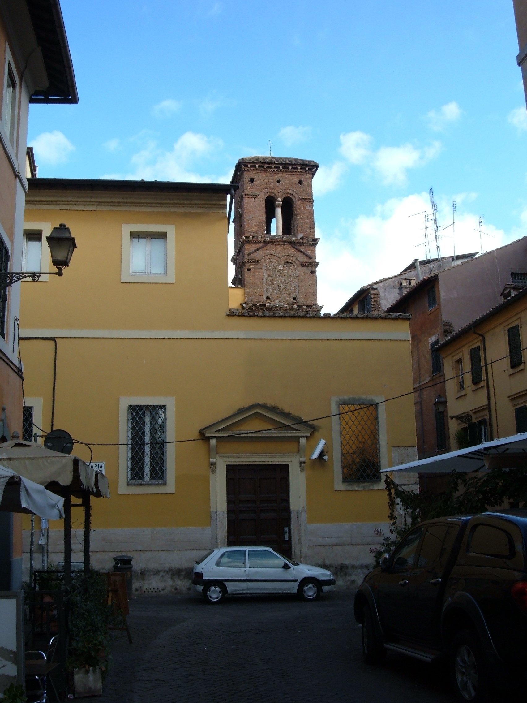 Chiesa delle Sante Rufina e Seconda, a Roma, nel rione Trastevere.